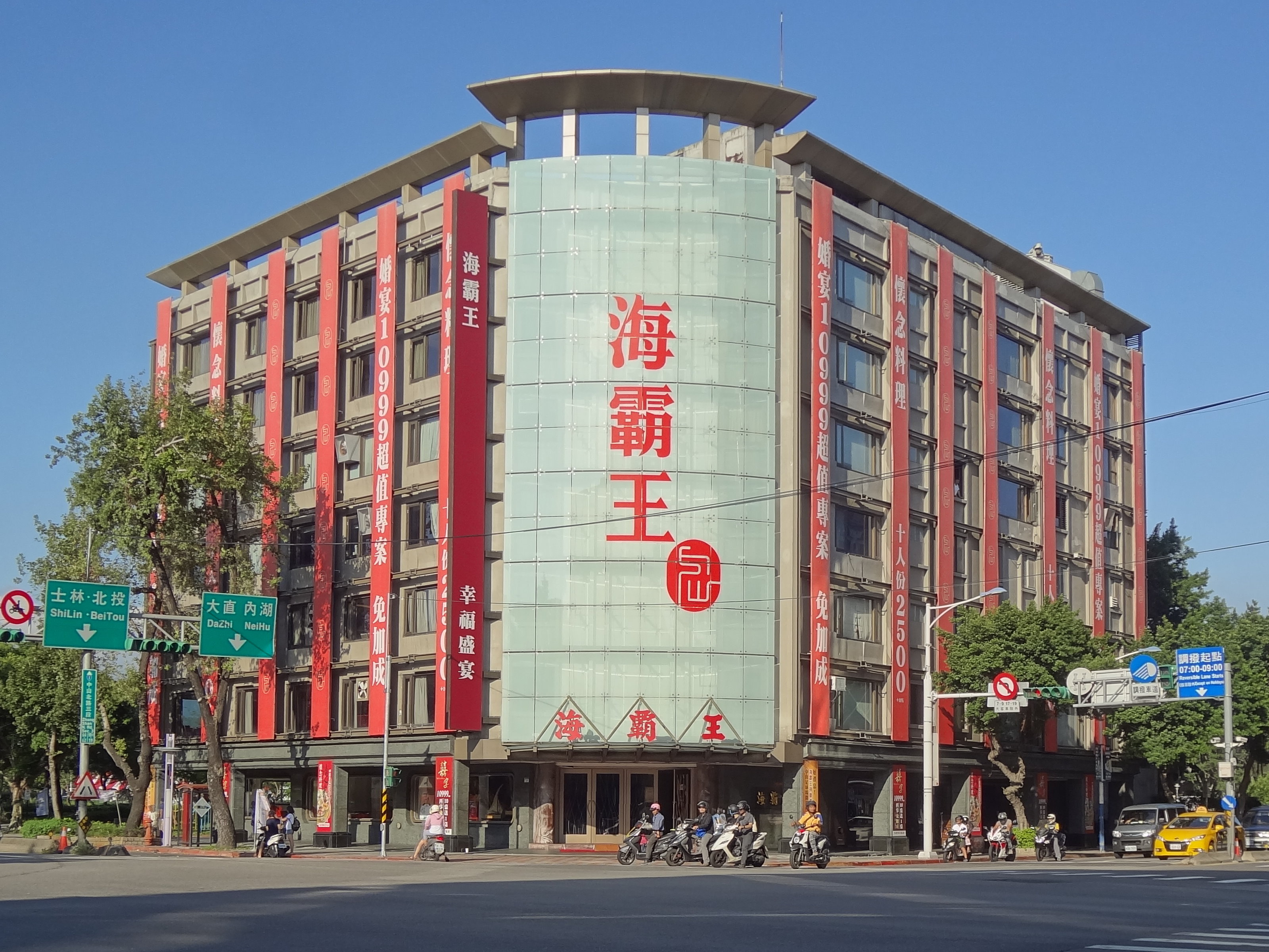 海霸王中山店，為海霸王旗艦店，地址：臺北市中山區中山北路三段59號（中山北路三段與民族東路口）。